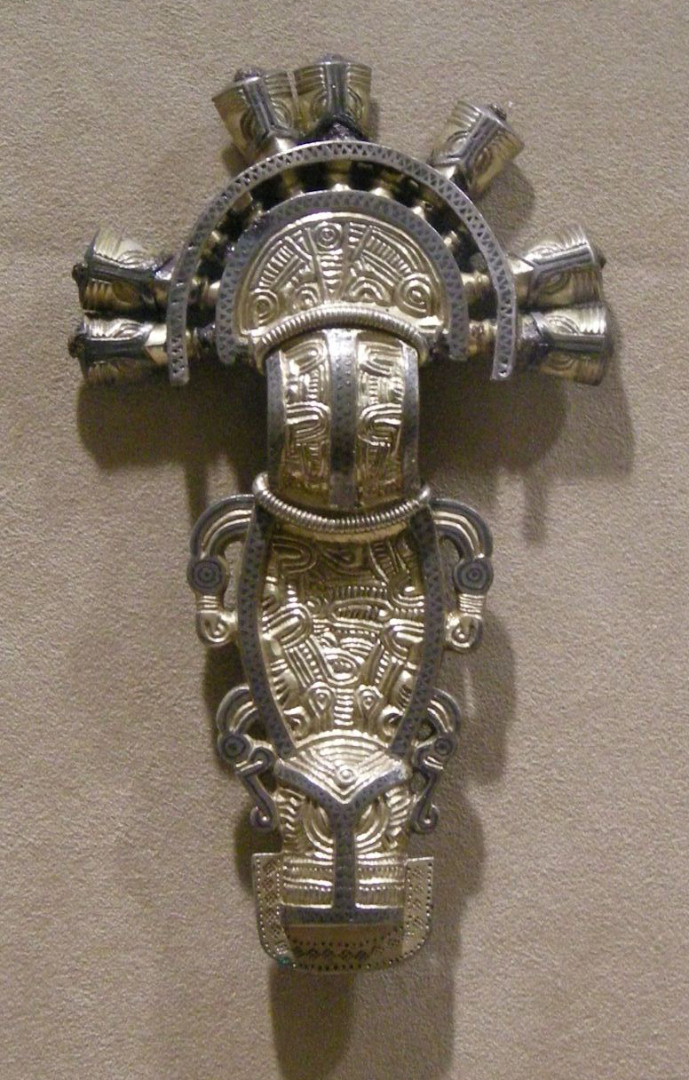 Met, langobardic, fibula, 600 circa